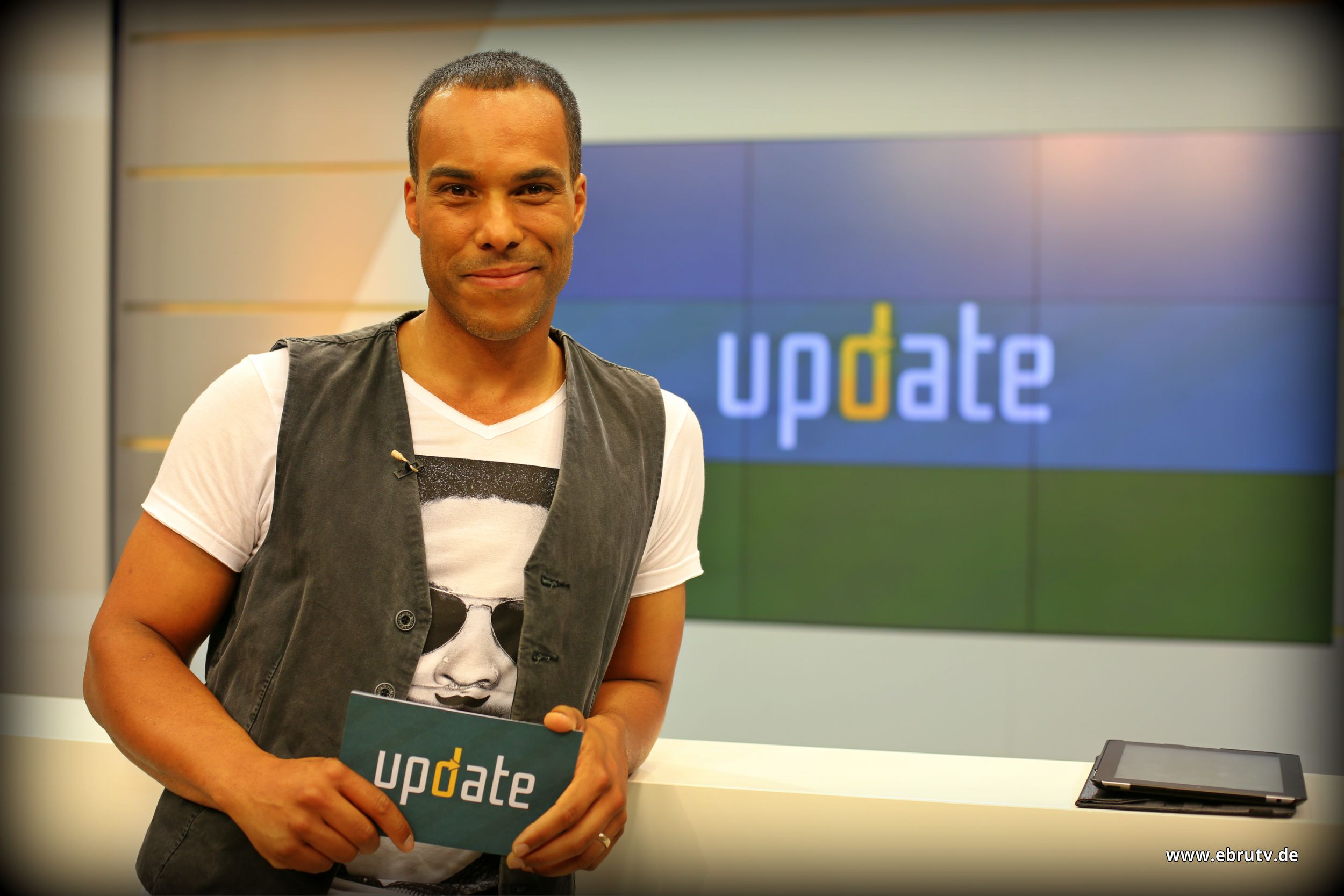 Update präsentiert jede Woche die neusten Trends aus der Welt der Computer, Tablets, Smartphones und Co. Es werden kreative Technologien vorgestellt und Interviews mit Experten und Entwicklern der Branche geführt. Update macht dich zum Technikexperten! Mit Update bleibst du auf dem neusten Stand!